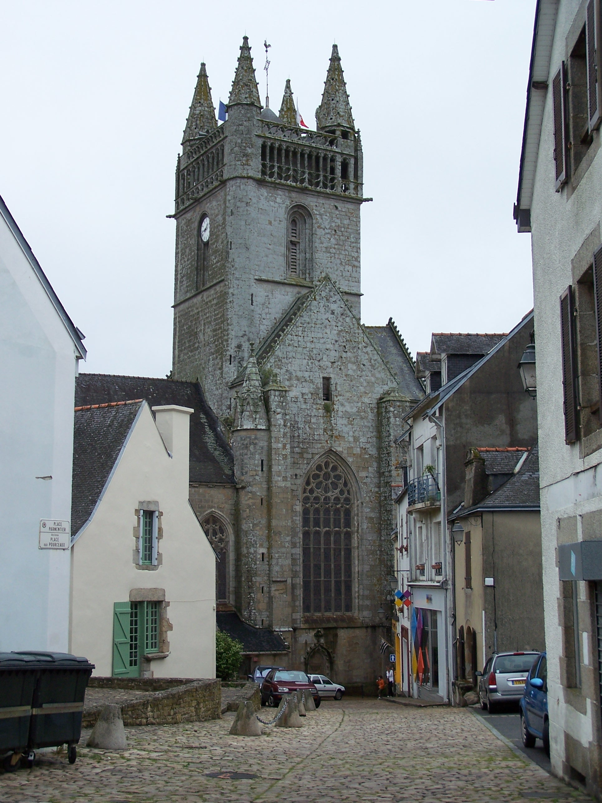 Tour de l'église Notre-Dame-de-l'Assomption à Quimperlé